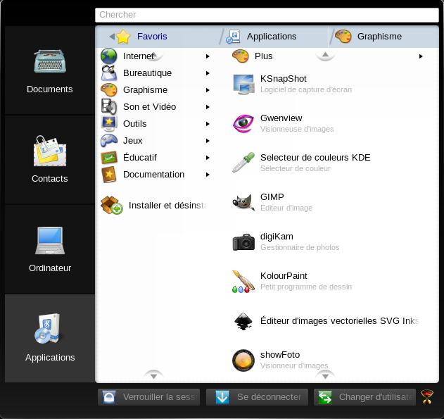 Image de Lancelot dans Mandriva 2009.